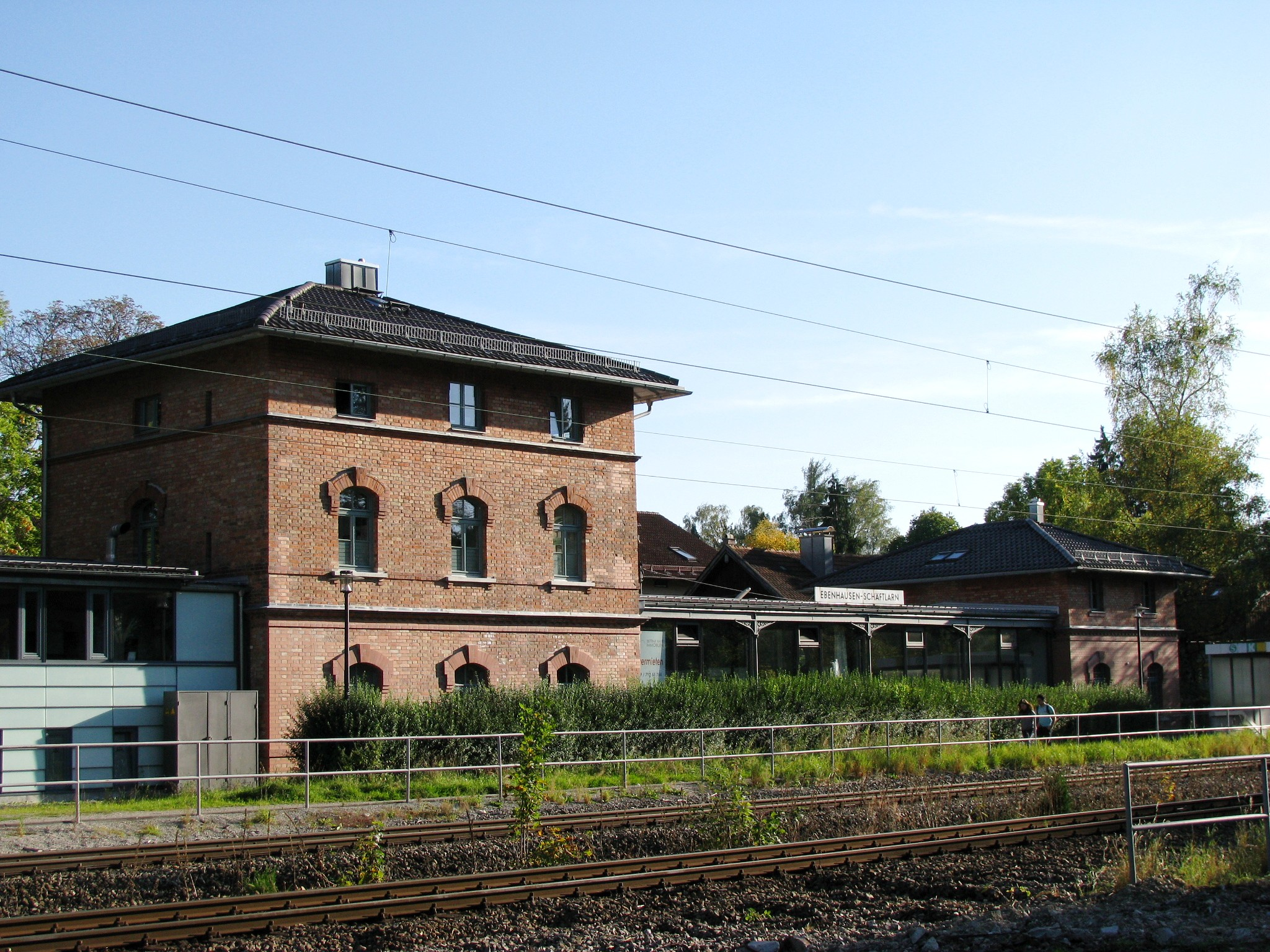 Ehem. Isartalbahnhof Ebenhausen, jetzt S-Bahnhof Ebenhausen-Schäftlarn, Westseite